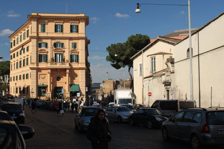 Calle de Roma - Italia